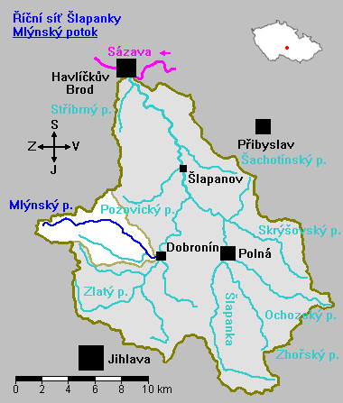 Říční síť Šlapanky - Mlýnský potok